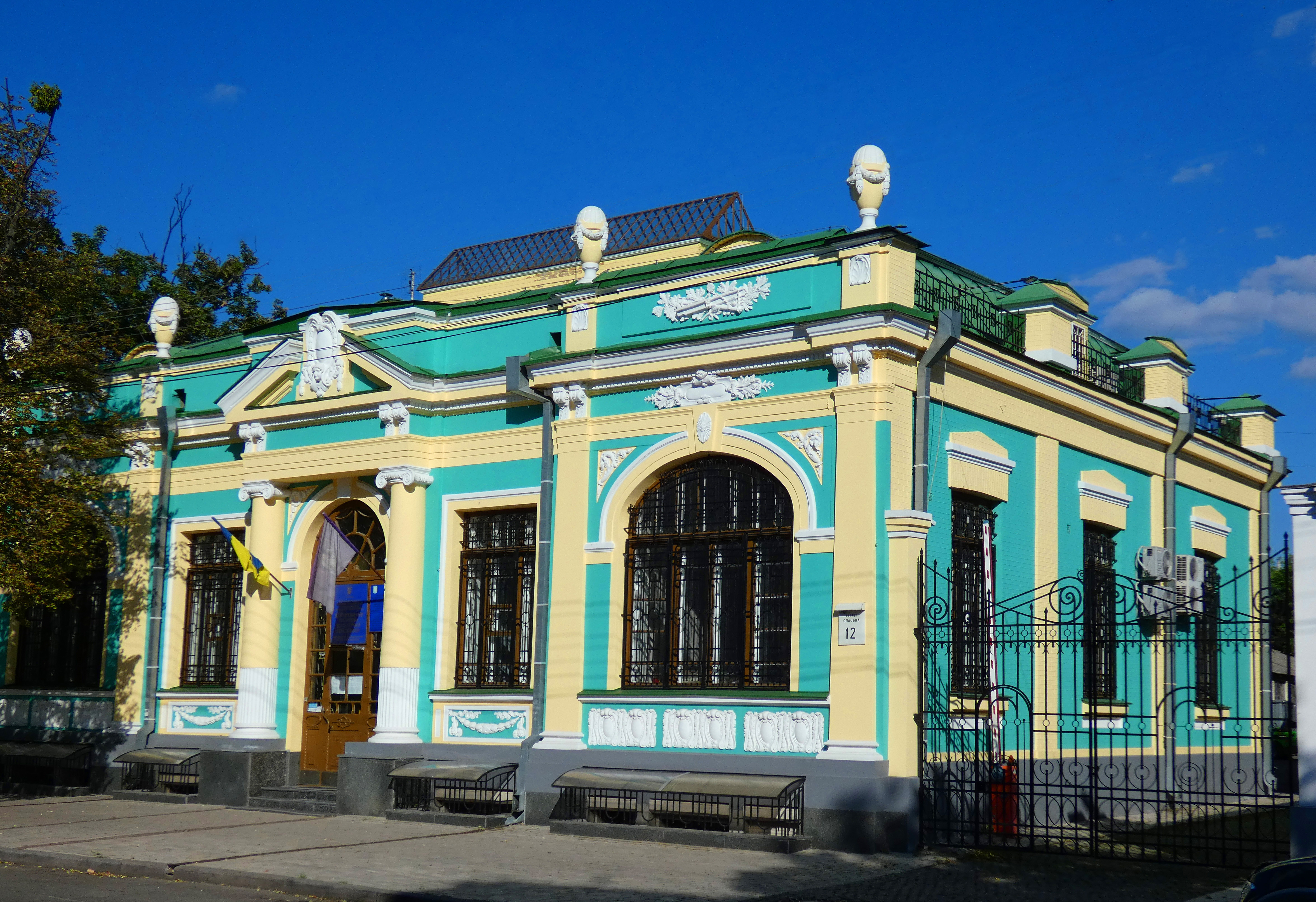 Будинок контори торгового дому «Т. М. Апштейн і сини», Київ, Спаська вул., 12